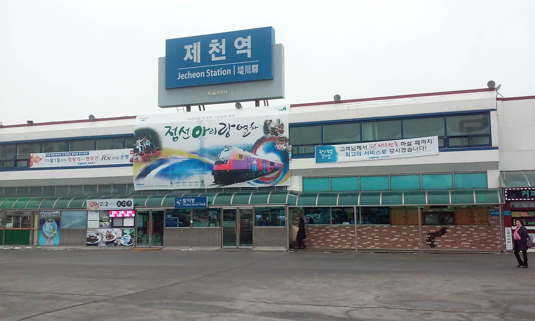 제가 찍었습니다.